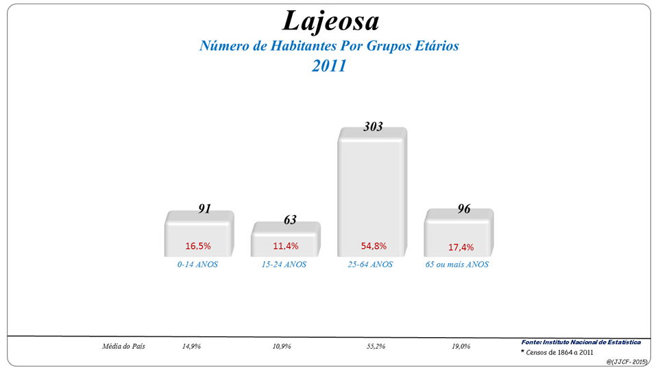 População